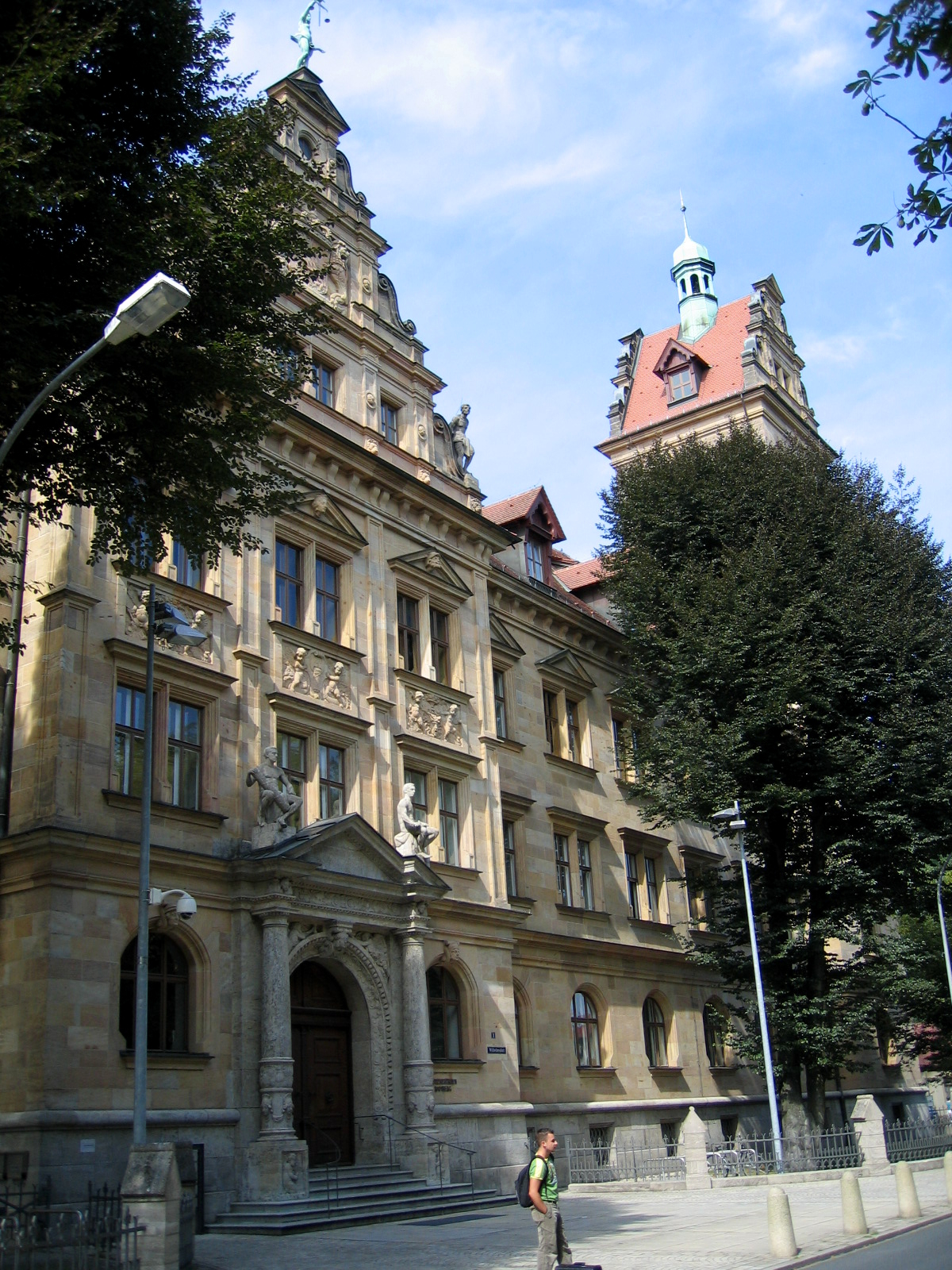 Description: Zentraljustizgebäude; Oberlandesgericht, Staatsanwaltschaft beim Oberlandesgericht, Landgericht, Staatsanwaltschaft, Wilhelmsplatz 1 in Bamberg (Germany) Source: selbst fotografiert Date: 09. Sept. 2005 Author: Bubo